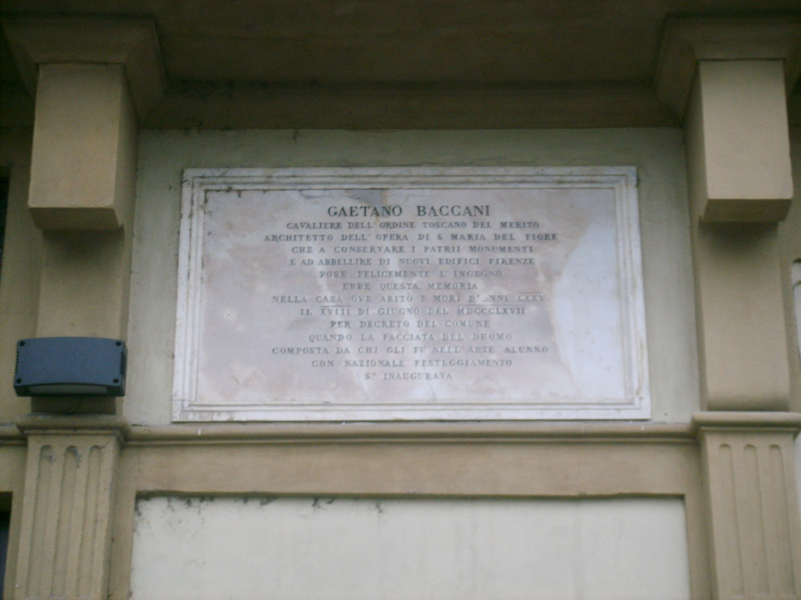 Plate of Gaetano_baccani,_piazza_santa_maria_novella